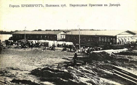 Параходна пристань (Кременчук): Параходна пристань у Кременчуці